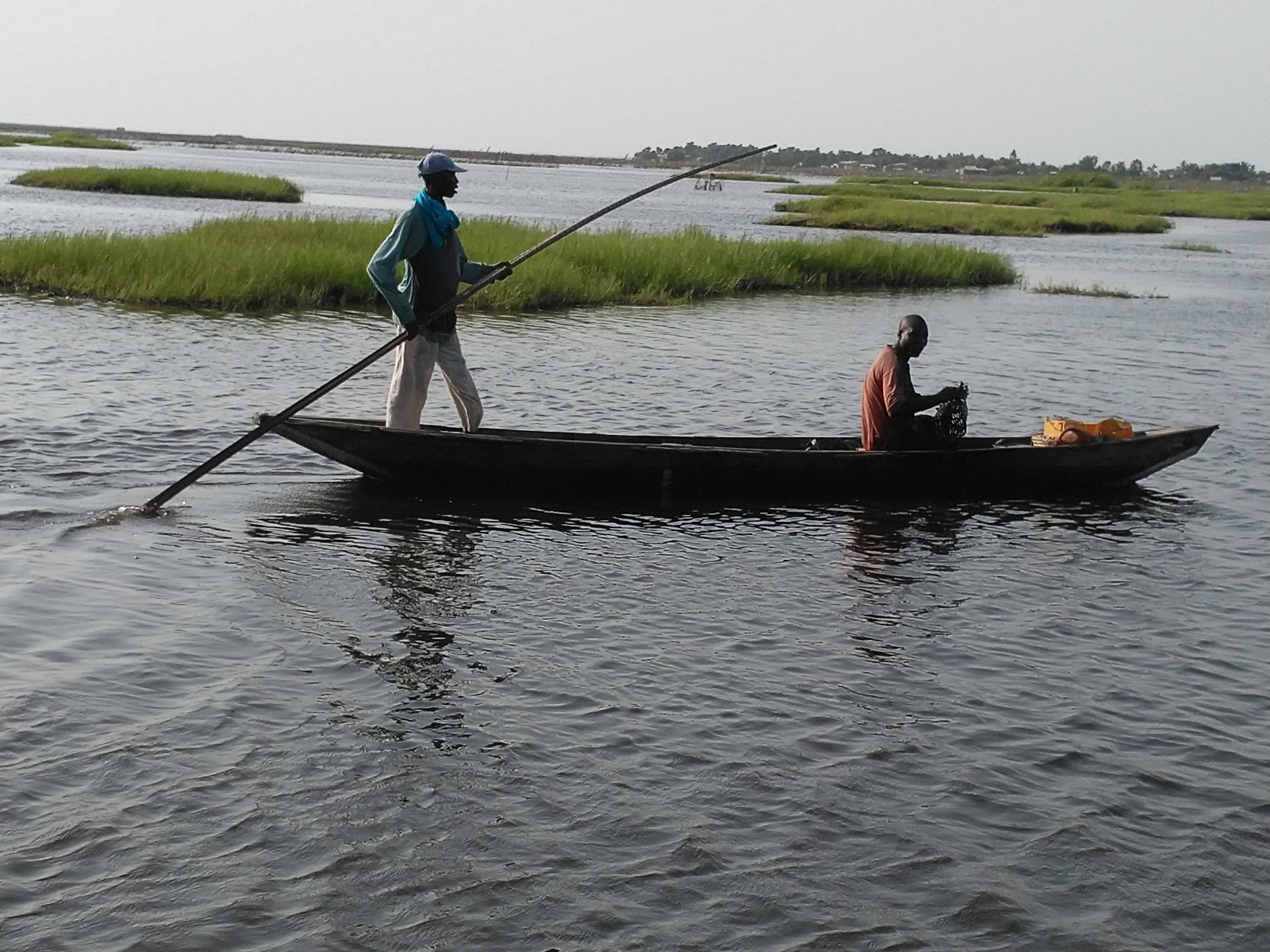 Des pêcheurs dans leur barque sur le lac Nokoué à Gbakpodi This is an image of "African people at work" from Benin